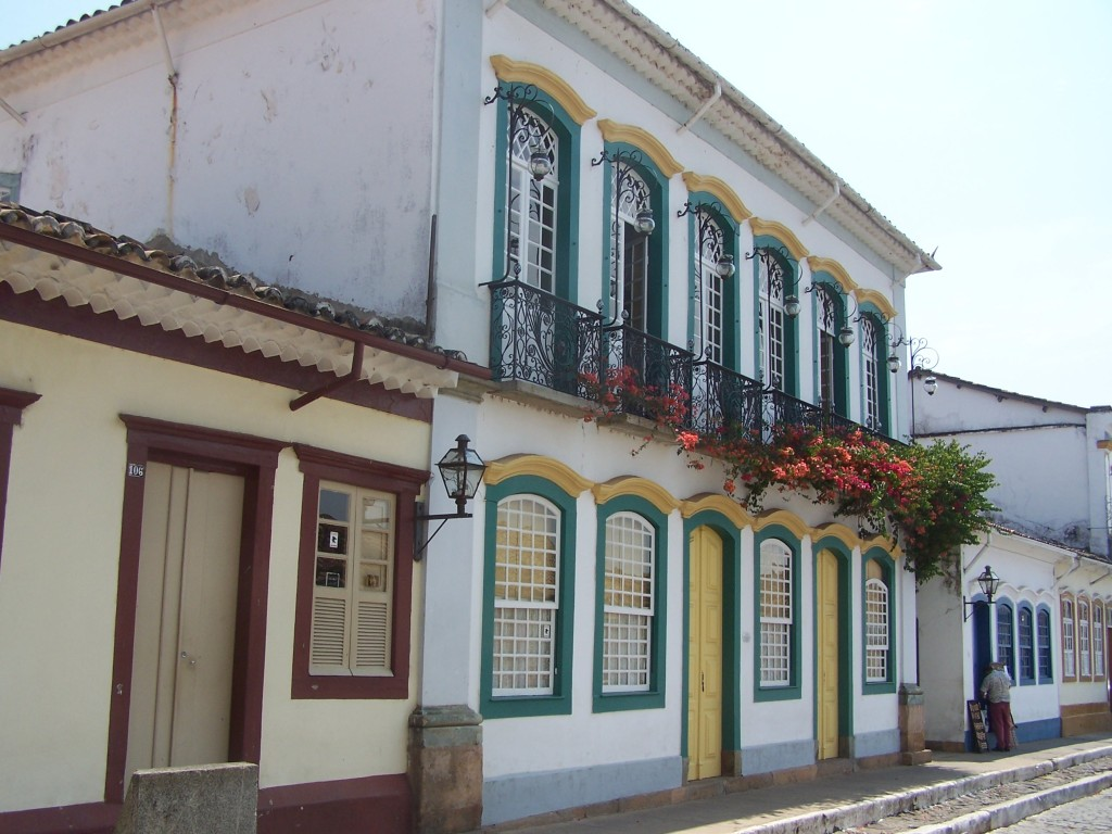 Solar dos Neves. São João Del-Rei - MG, Brasil.